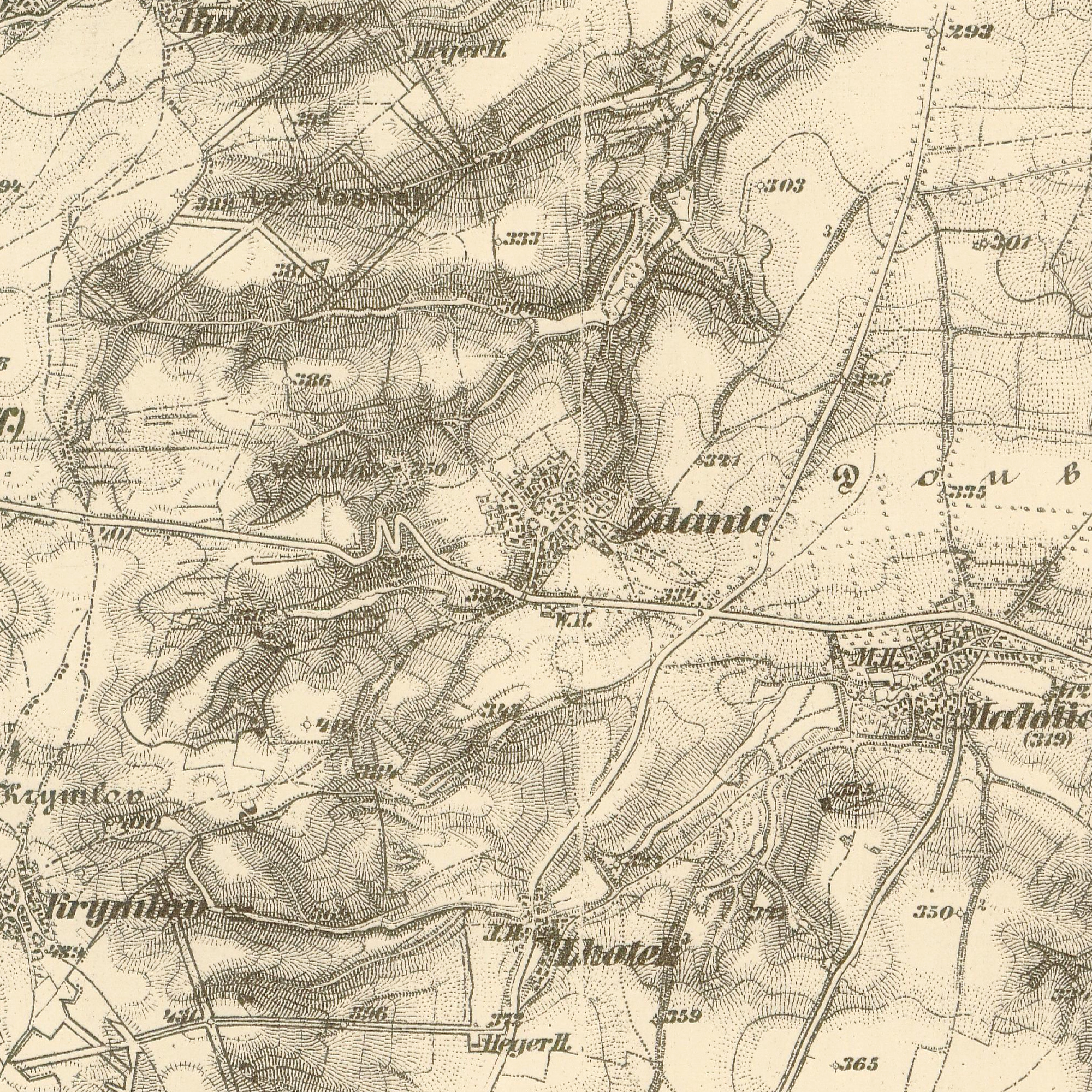 Ždánice na mapě 3. vojenského mapování, Topografické sekce 3. vojenského mapování měřítko 1:25 000, mapový list 4054/1, 6. vydání